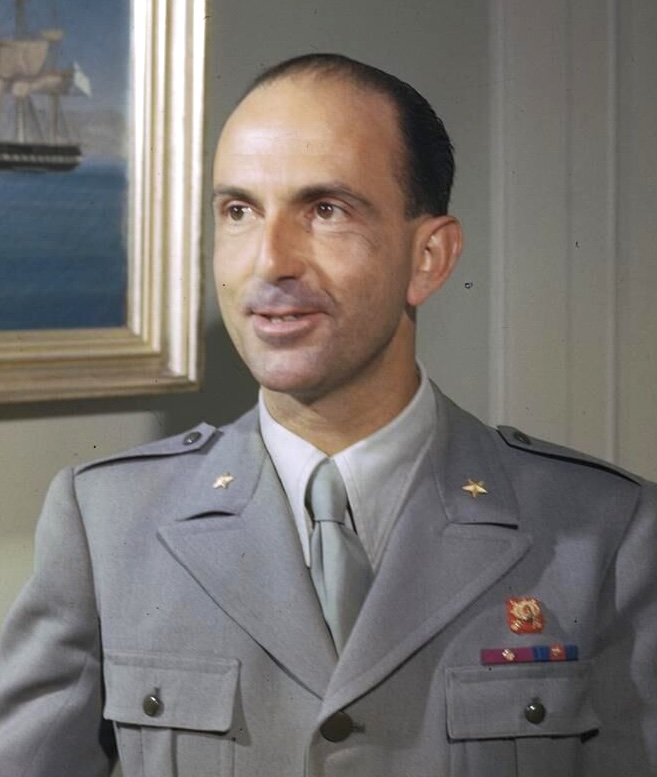 Umberto II, last King of Italy.